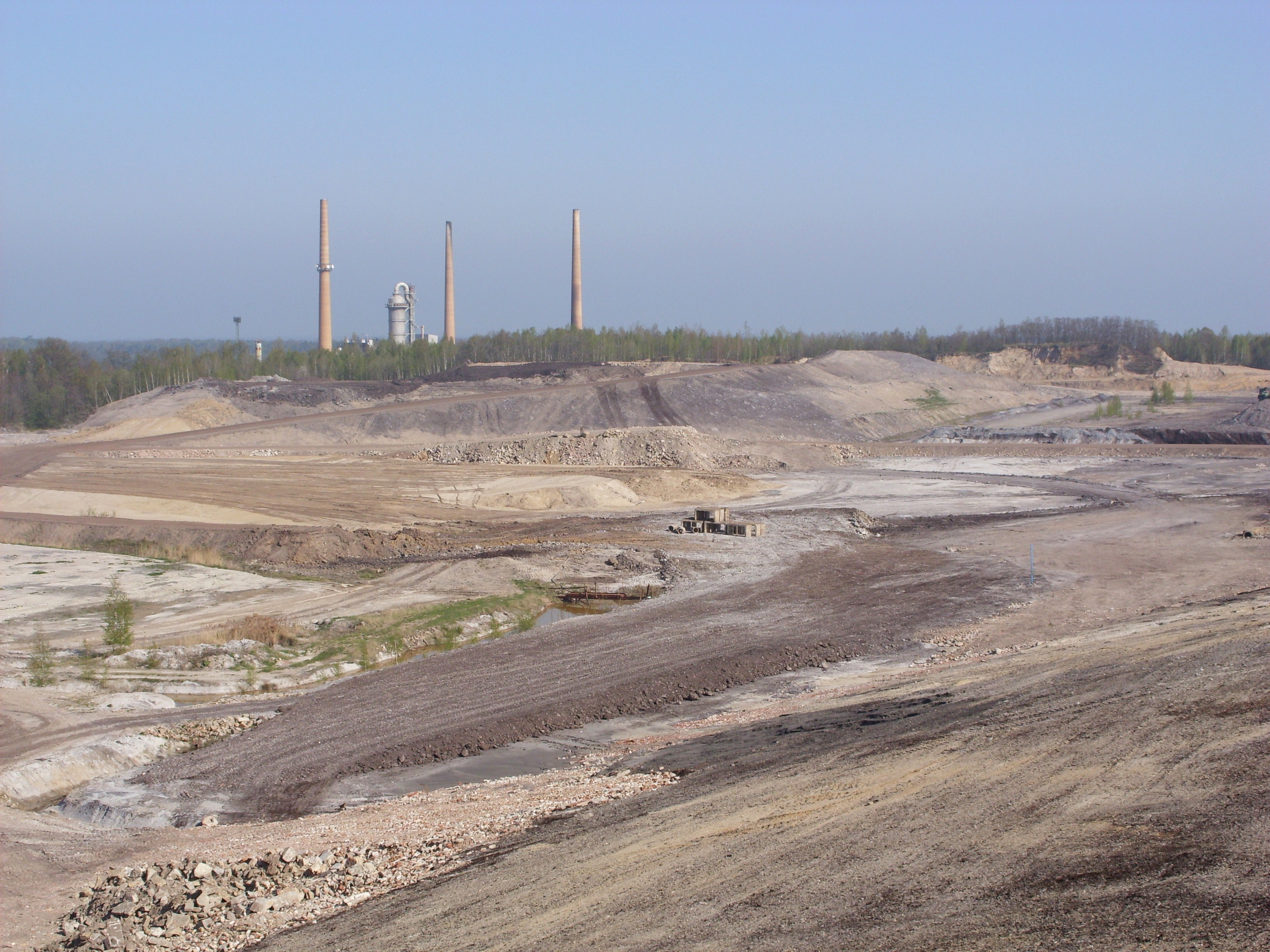 Alter Tagebau zwischen Wetro und Puschwitz, Landkreis Bautzen. Hornjoserbsce: Stara wotkryta jama pola Wětrowa, gmejna Bóšicy, wokrjes Budyšin.